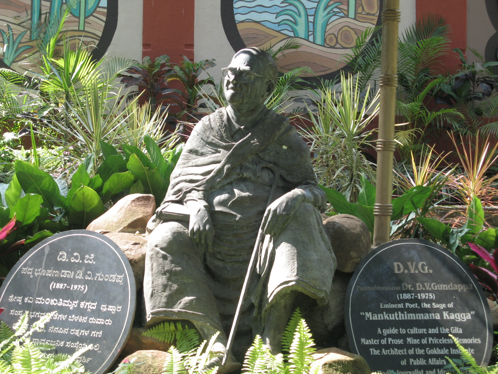 DVG statue at Bugle Rock Gardens, Bengaluru.